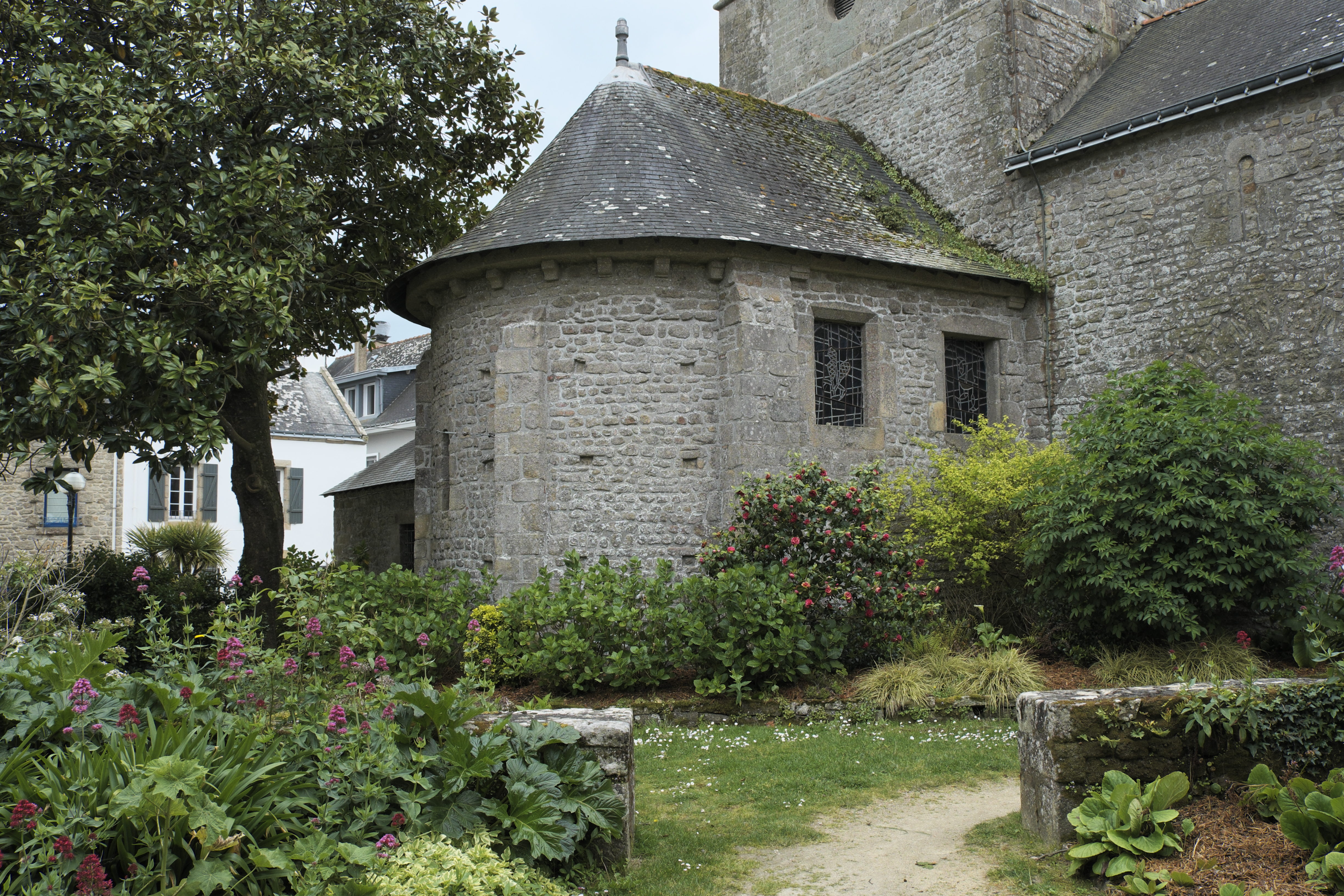 Katholische Pfarrkirche Notre-Dame-de-Kerdro in Locmariaquer im Département Morbihan (Region Bretagne/Frankreich), romanische Apsis